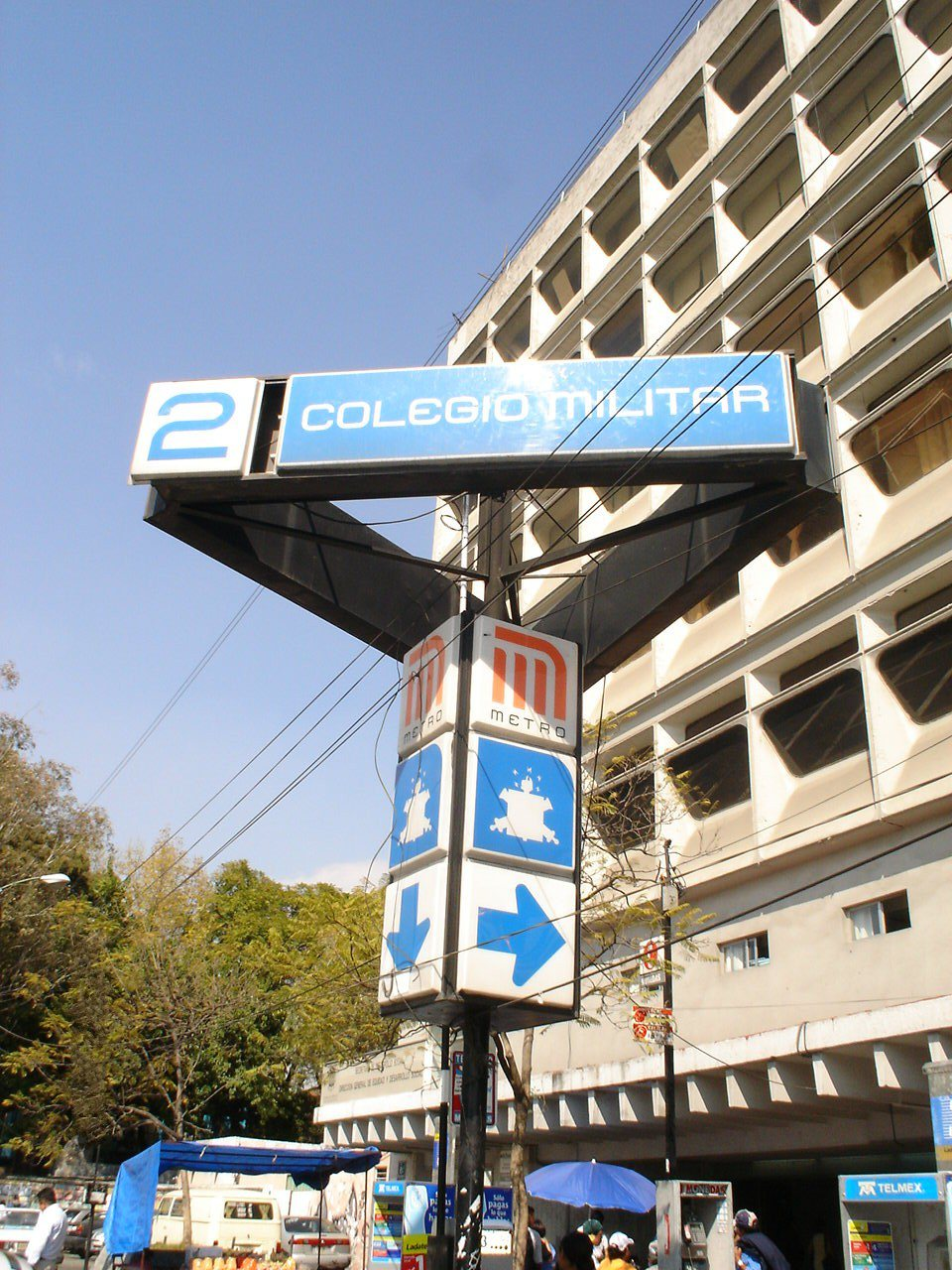 ESTACION COLEGIO MILITAR